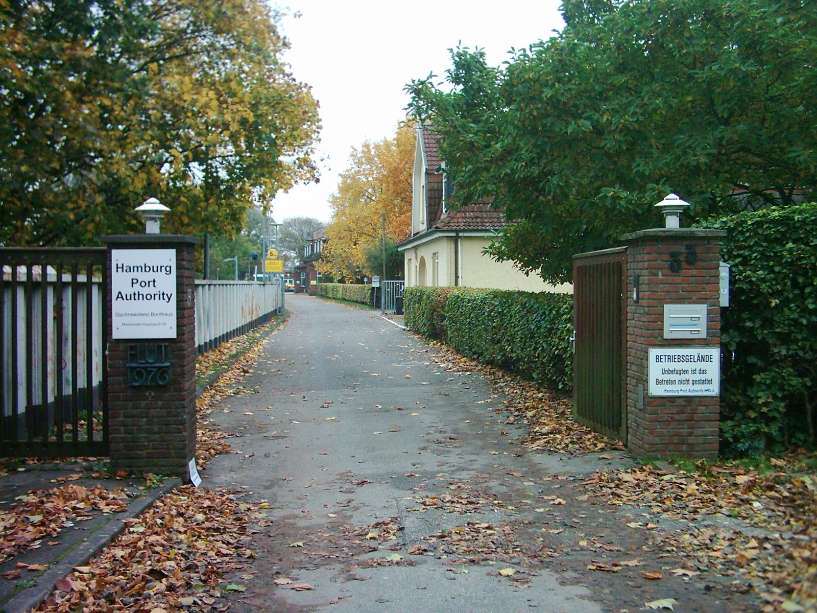 Die Stackmeisterei Bunthaus der HPA in Hamburg-Moorwerder.